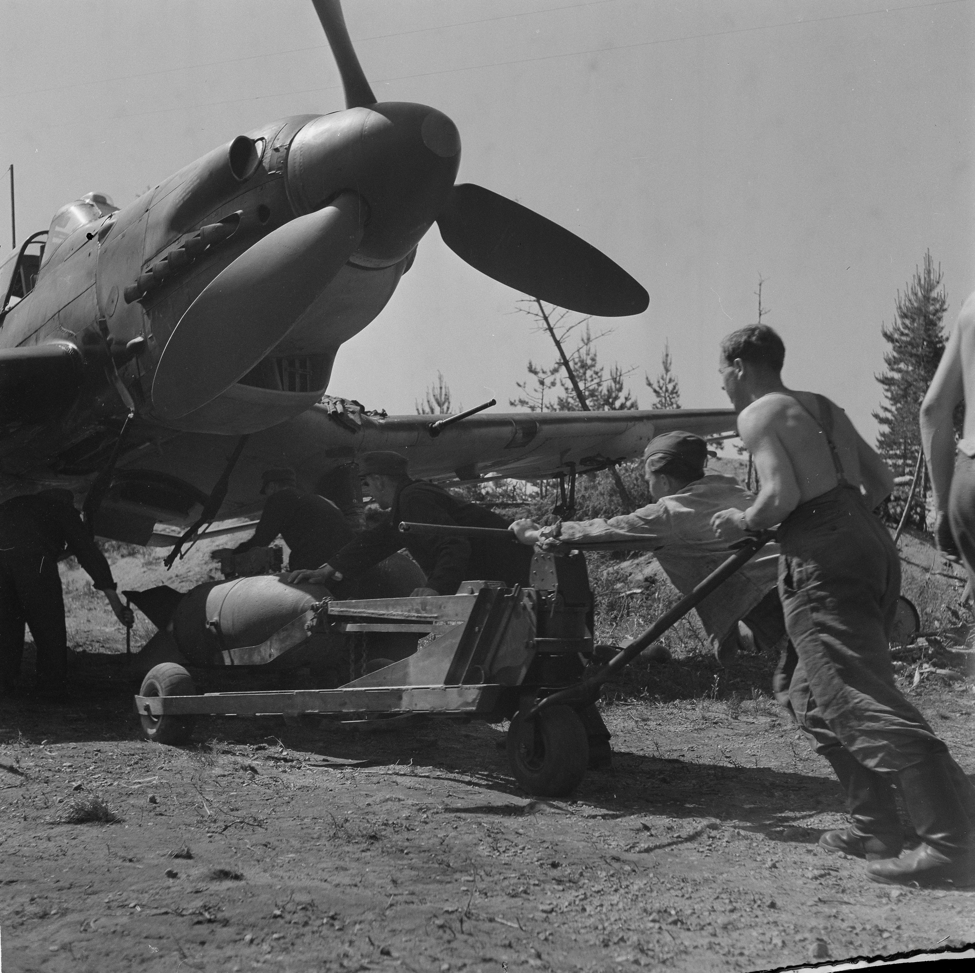 500 kg pommia kiinnitetään Stuka-syöksypommittajaan. Immolan lentokenttä 1944.06.28